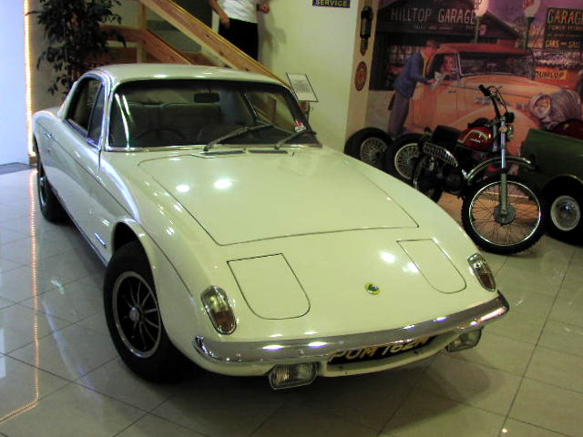 Lotus Elan S 130 (1973)